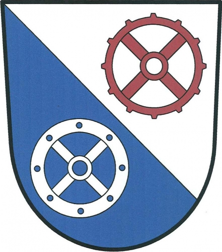 Radiměř